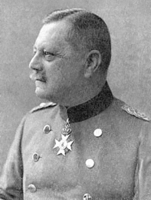 Karl Victor von Wilsdorf (1857—1920); Kriegsminister und Generalleutnant der sächsischen Armee